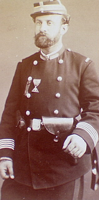 Adolphe Alphonse Assi (1841-1886)